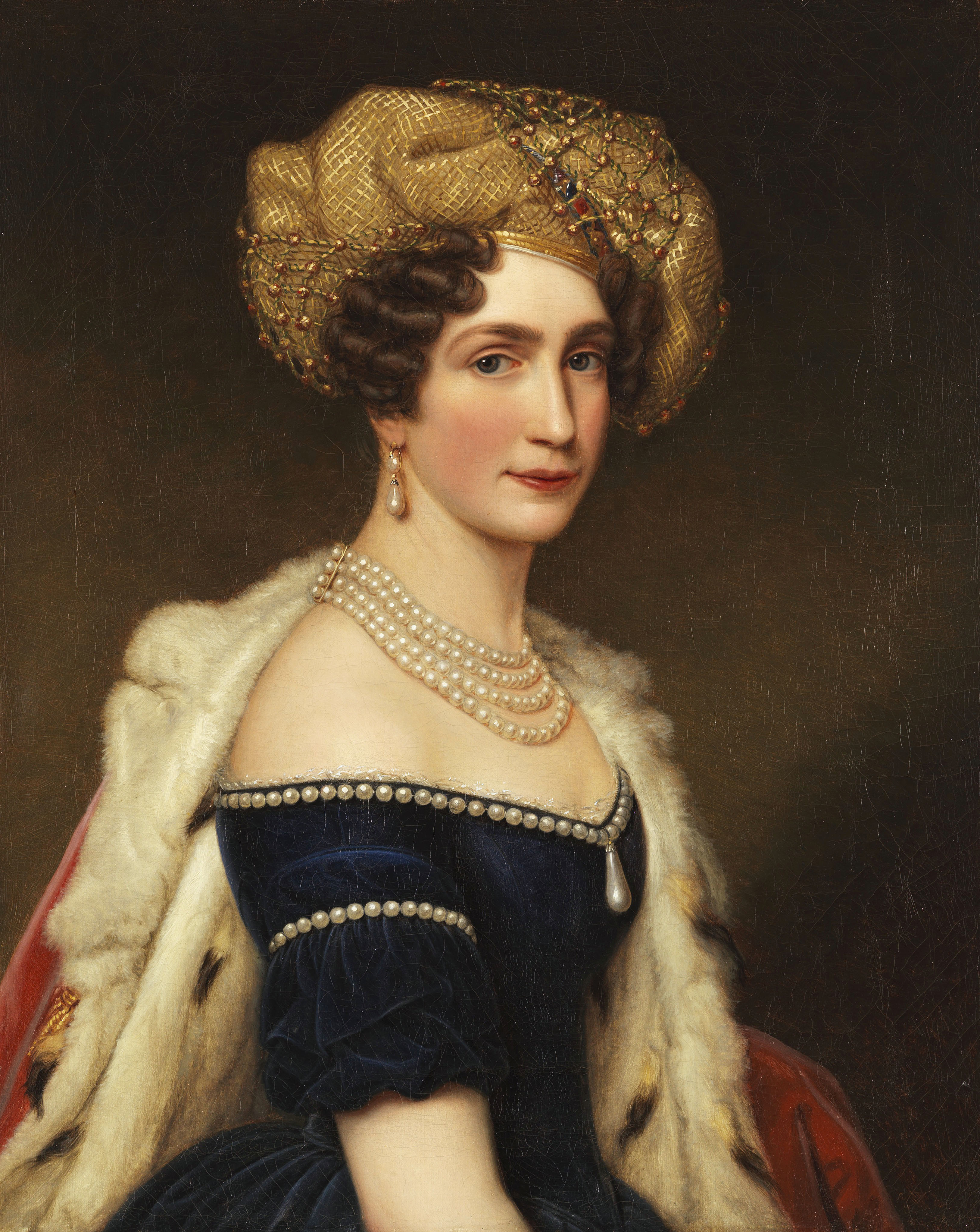 Auguste Amalie Prinzessin von Bayern, Herzogin von Leuchtenberg (1788-1851). Öl auf Leinwand. 74,5 x 60 cm